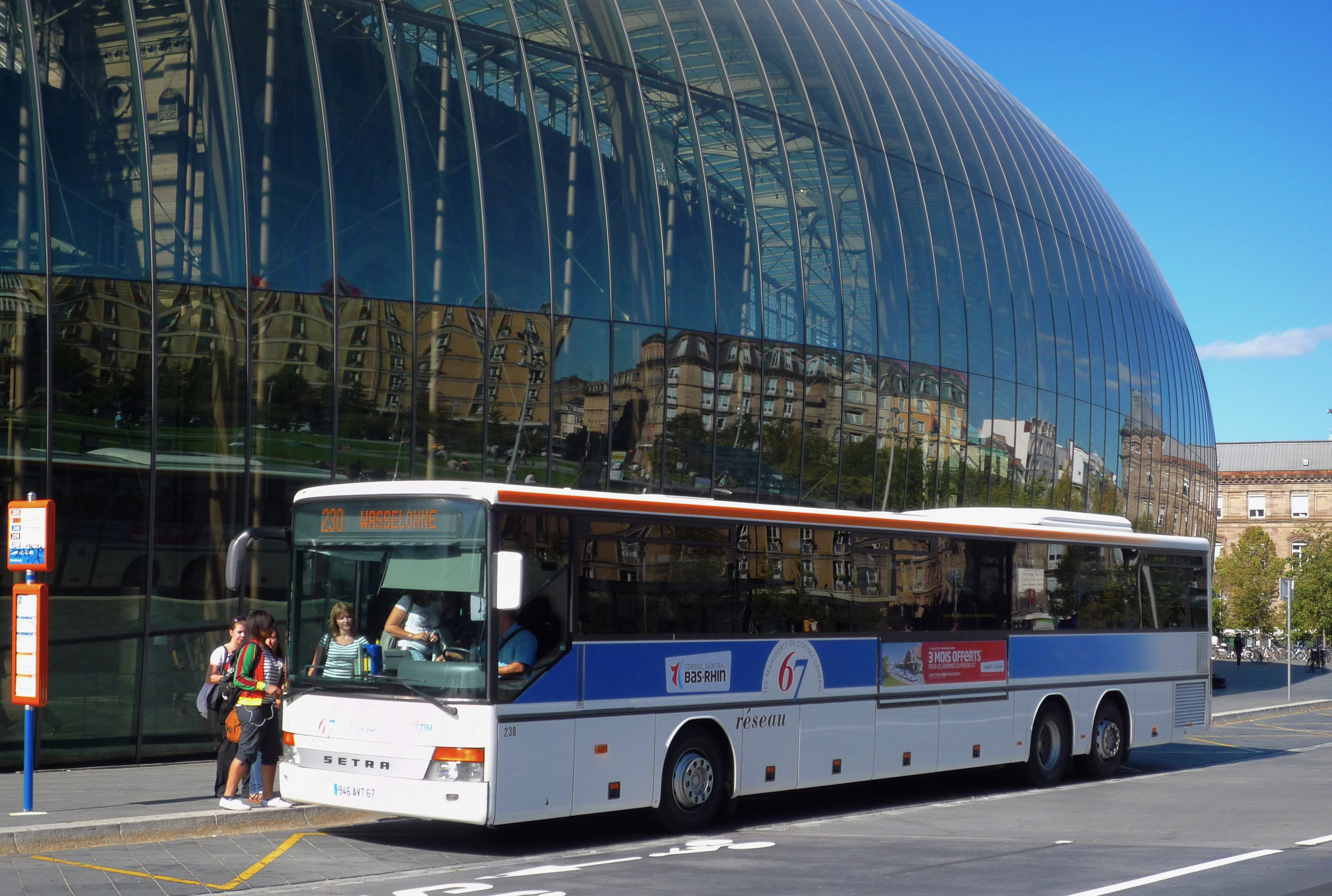 Strasbourg, devant la gare centrale. Autocar du « Réseau 67 », ligne 230 Strasbourg - Wasselonne. 2011.